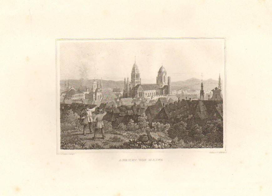 Gesamtansicht von Mainz am Rhein. Stahlstich von Lange / Willmann, ca. 1848. Bildgröße 15,5 x 10 cm. Neues Stadttheater von Moller, Kirchentürme bzw. teilweise Kirchenschiffe der Stadtsilhouette (Dom mit Moller Kuppel). Ganz rechts das Rochusspital.